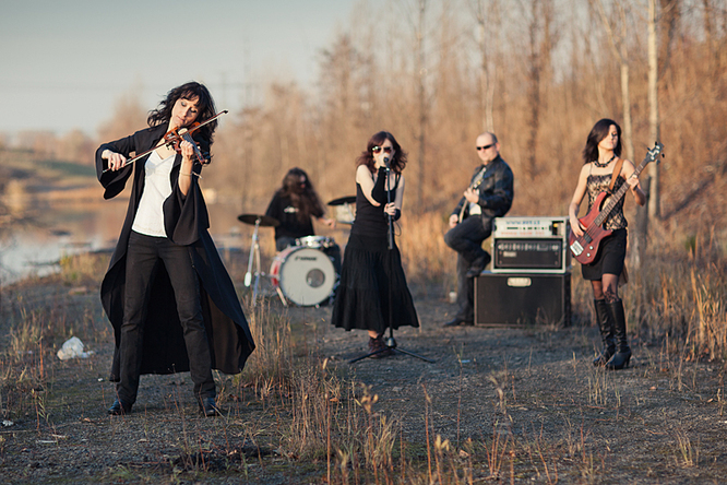 Česky: kapela dona said yes